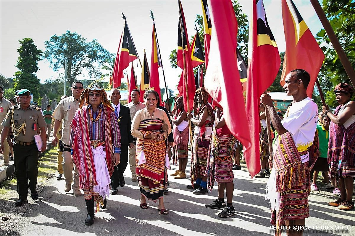 Präsident Francisco Guterres besucht die Gemeinde Viqueque